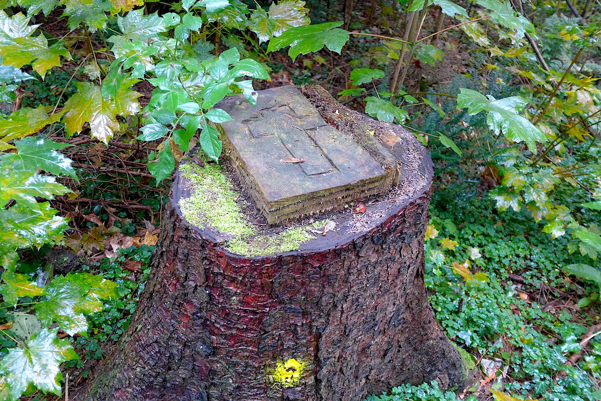 "Тропа Клинка" - туристский маркированнный маршрут вокруг немецкого города Золинген (Северный Рейн-Вестфалия). Седьмой этап: окрестностями Лангенфельда. 8.4 км.